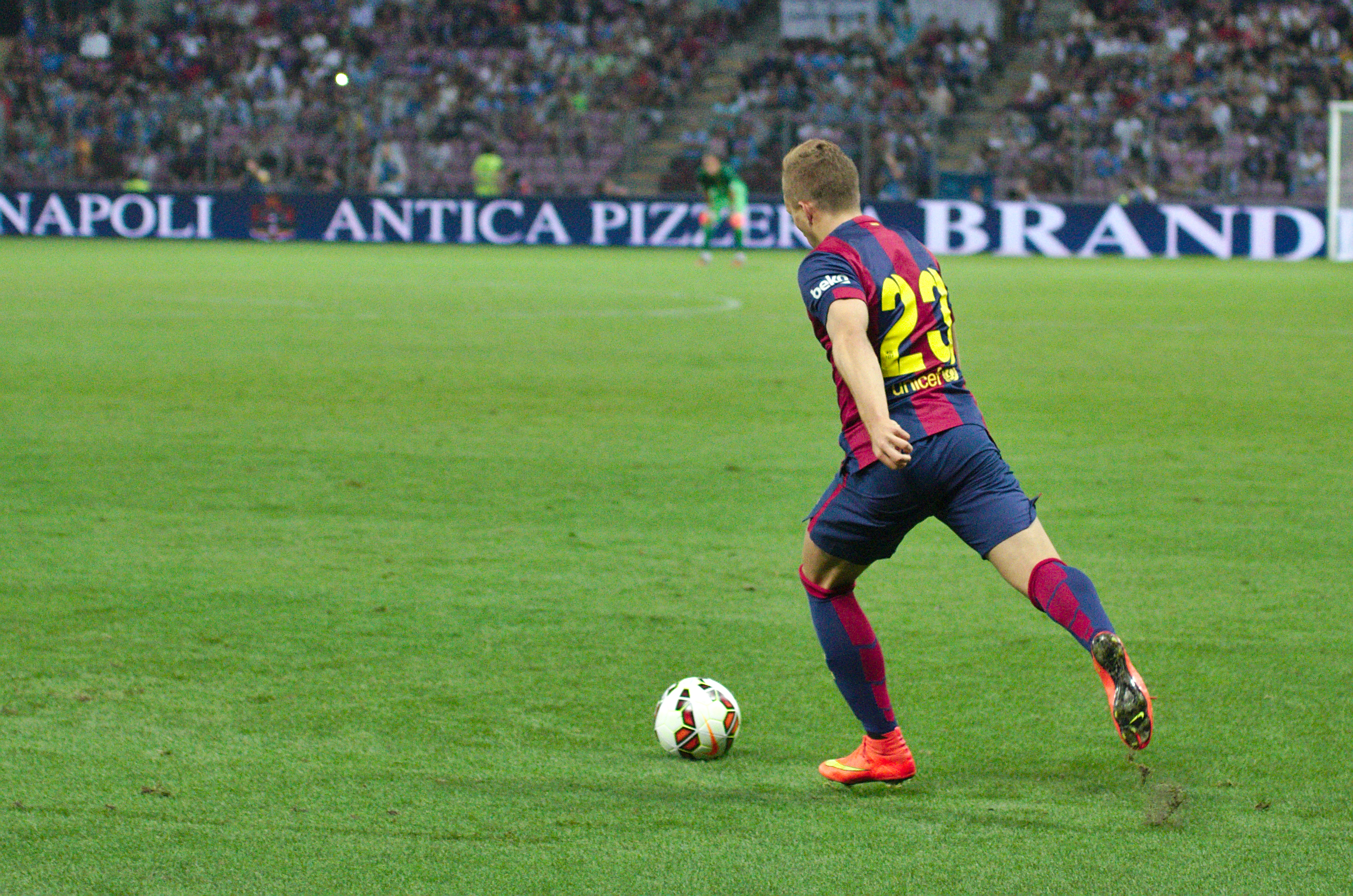 Barça - Napoli - 20140806